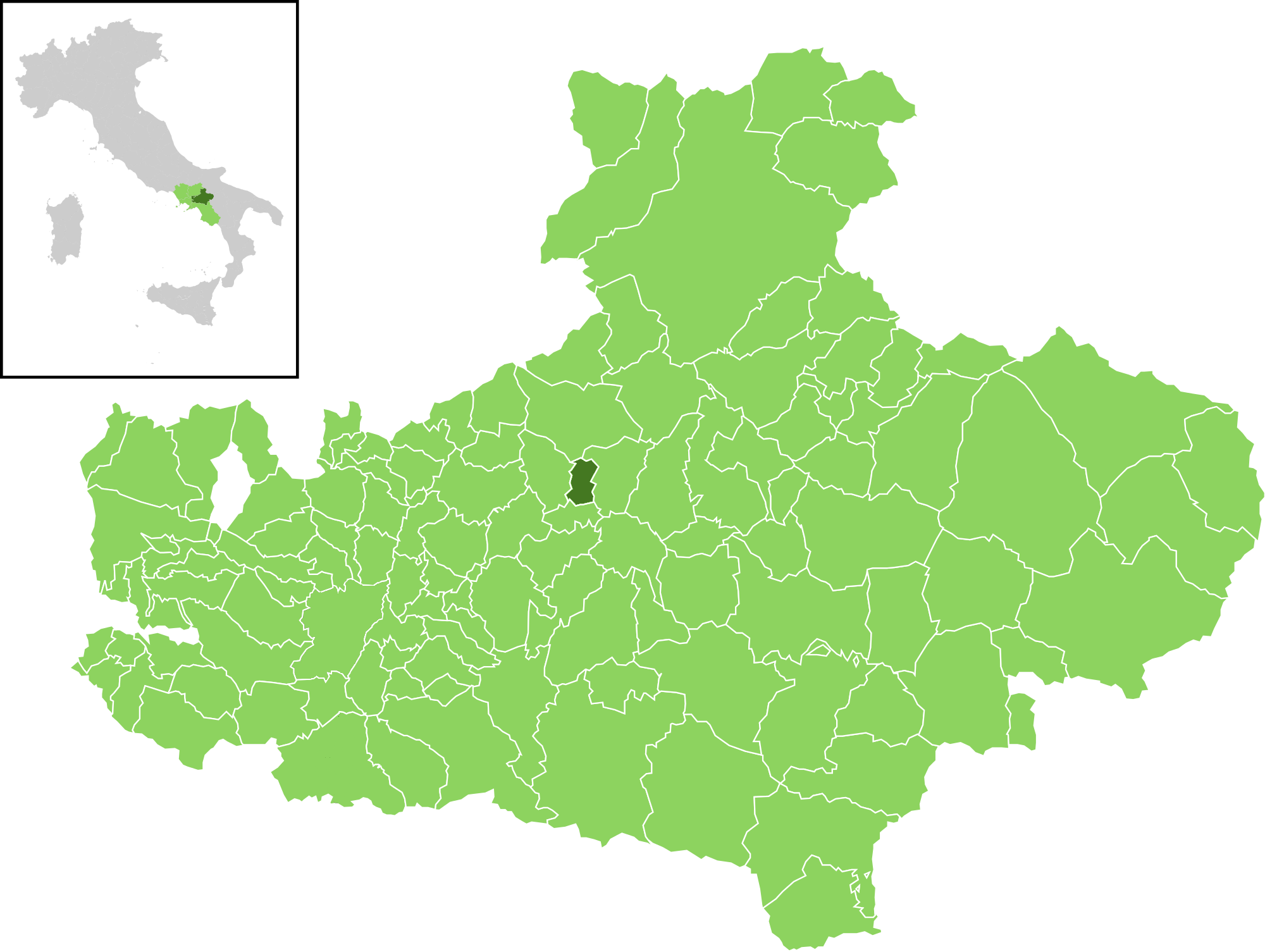 Posizione del comune all'interno della provincia di Avellino